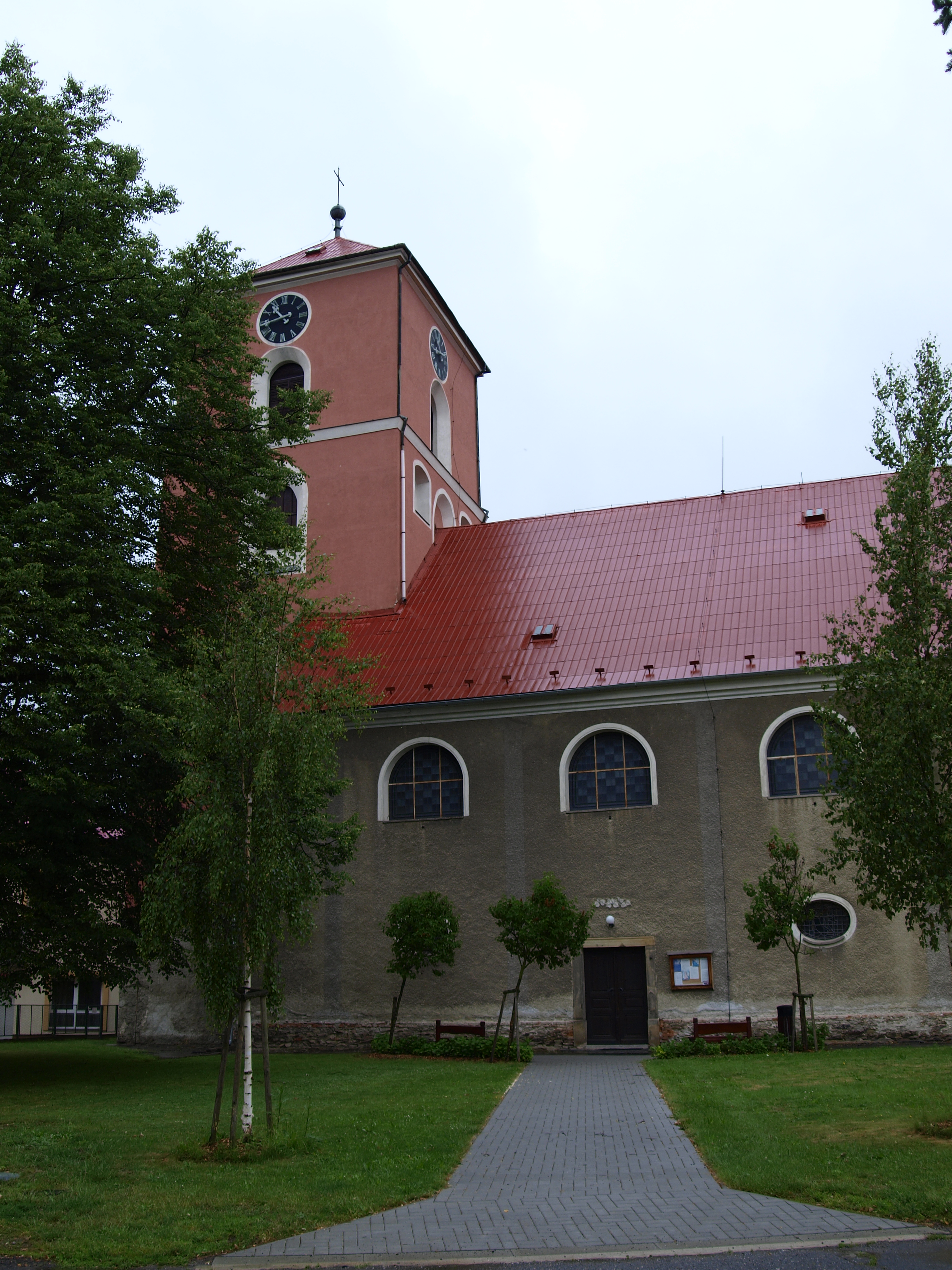 This file was uploaded during the project of WikiTown Litovel. Kostel Nanebevzetí Panny Marie na návsi v Hnojicích, okres Olomouc, pohled od fary